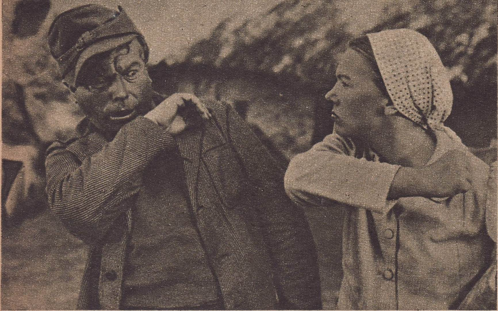 Hanka Bielicka i Jan Kurnakowicz podczas kręcenia filmu Jasne łany, 1947